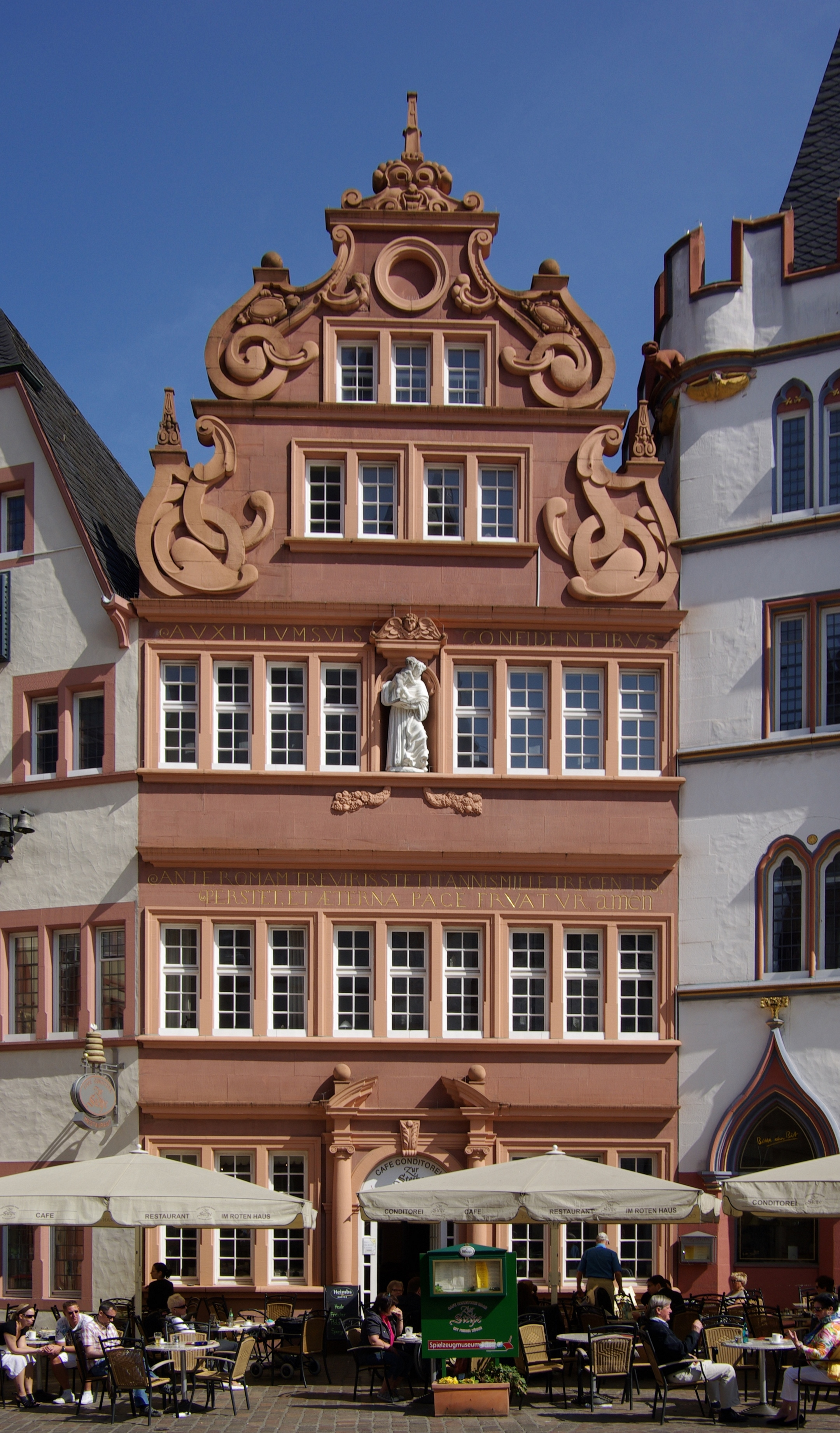 Trier,Dietrichstraße 54: sogenanntes Rotes Haus; repräsentativer Spätrenaissancebau, zweigeschossiger Volutengiebel, Nischenfigur, 1684 (1968–70 rekonstruiert); straßen- und platzbildprägend